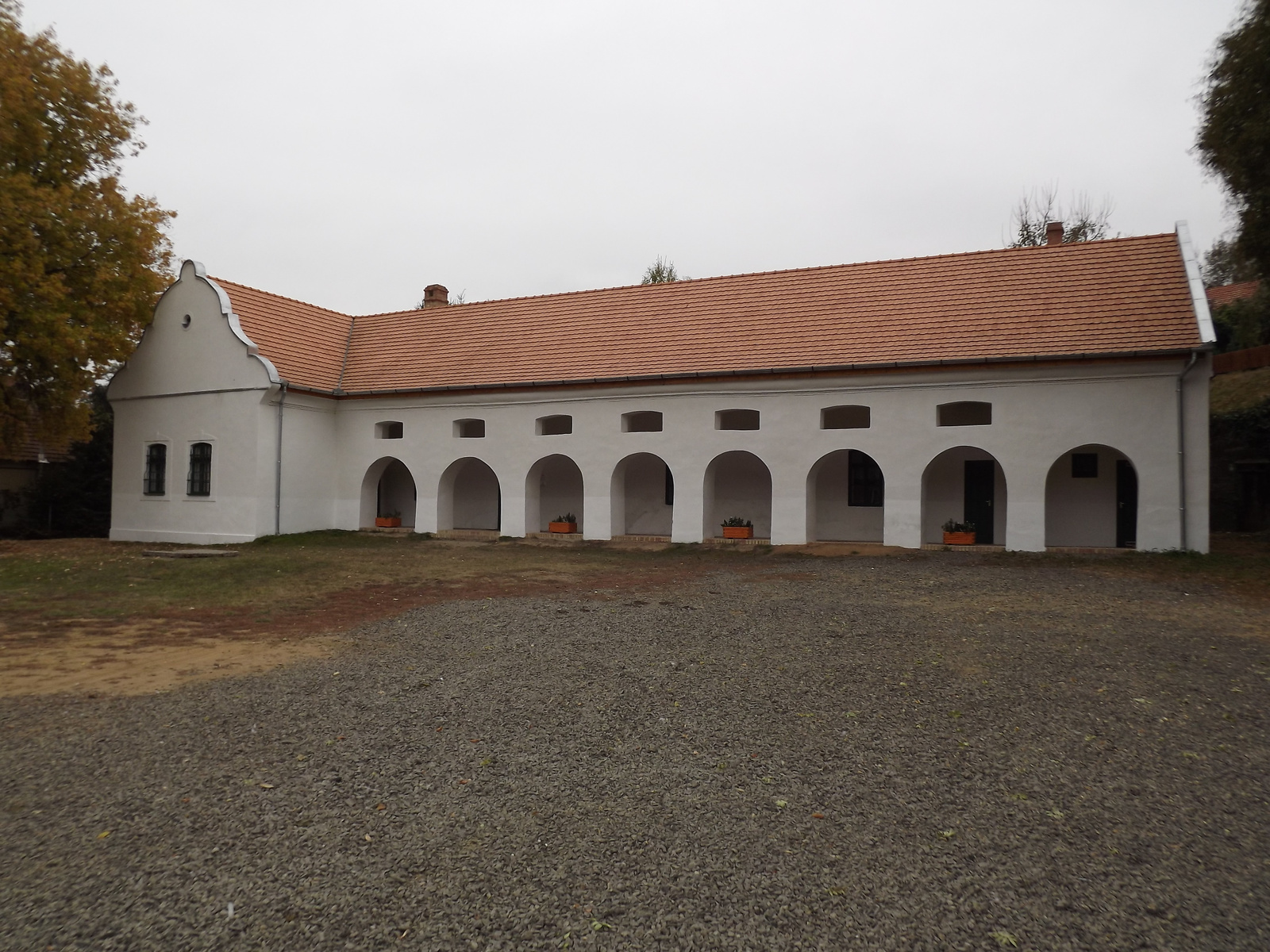 Harmos-Kiss-kúria. Építtette a Harmos család 1800 körül. 1920 körül került a Kiss-család birtokába, homlokzatát valószínűleg ekkor alakították át. (Varsány, Rákóczi Ferenc utca 2.) This is a photo of a monument in Hungary. Identifier: 6851